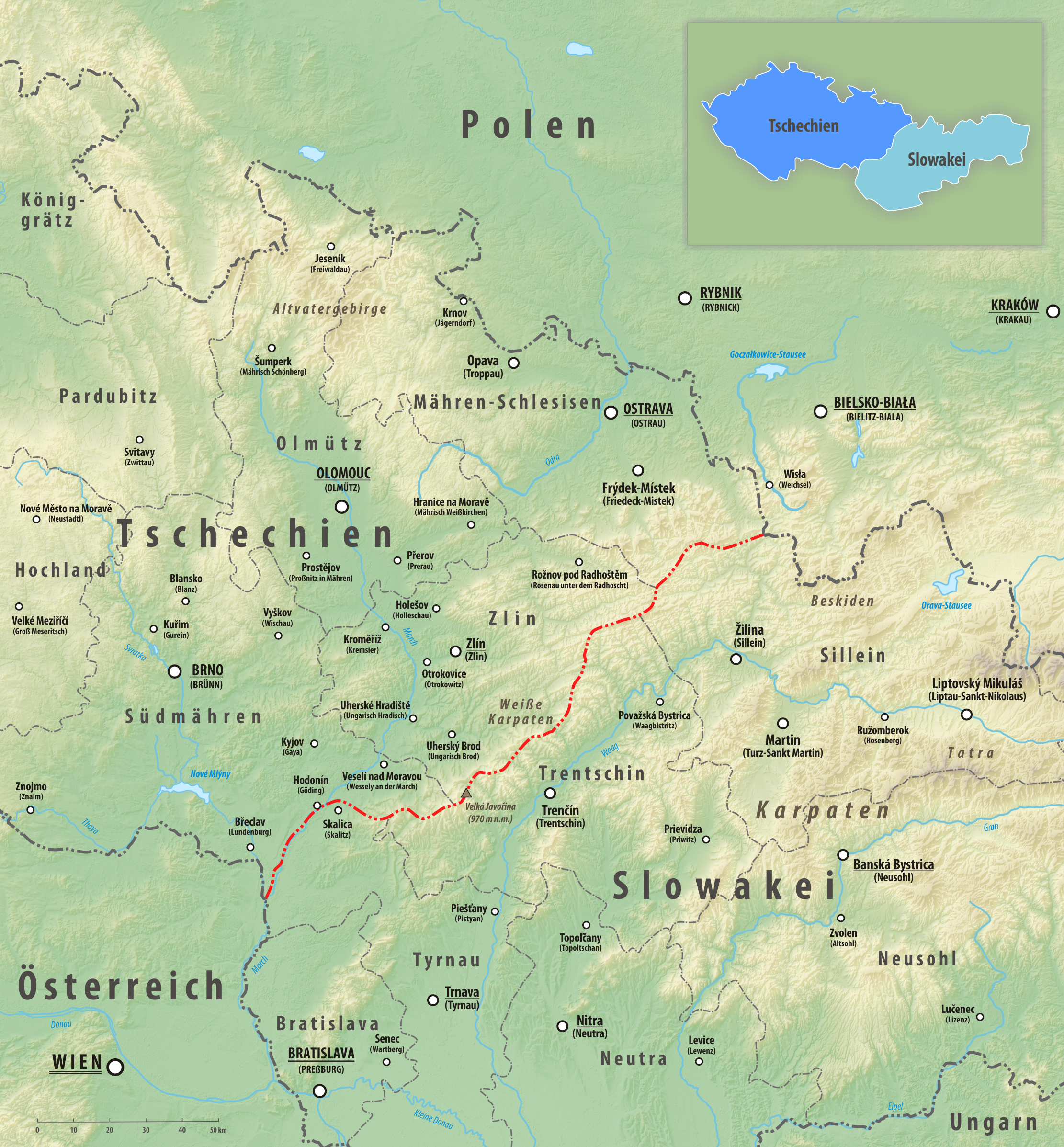 Reliefkarte des Grenzverlaufes zwischen Tschechien und der Slowakei Topographischer Hintergrund: NASA Shuttle Radar Topography Mission (public domain). SRTM3 v.2.